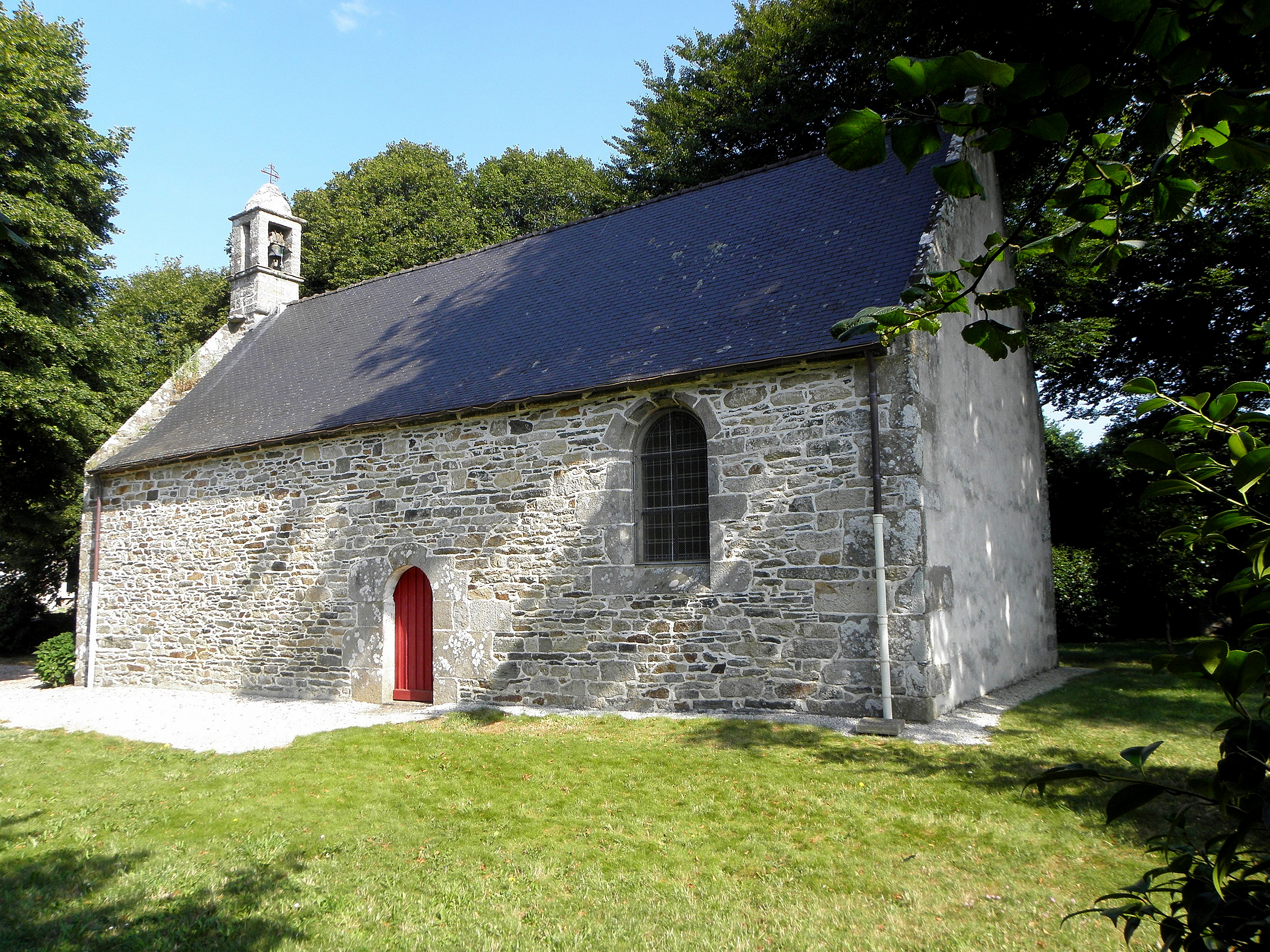 Chapelle Saint-Joseph de Peumerit (29). Flanc sud.